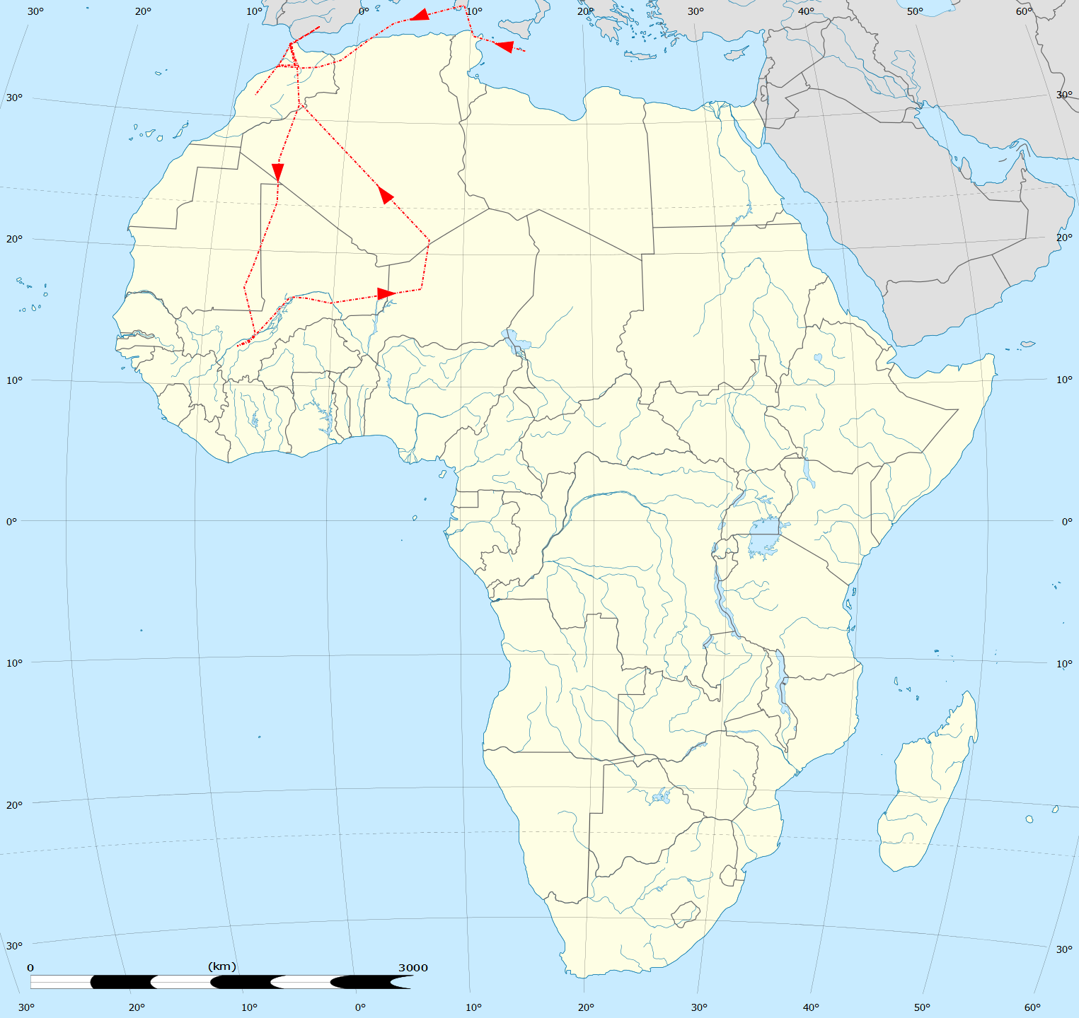 Ibn Battuta Reiseroute 1349–1354 (Nordafrika, Spanien und Westafrika)